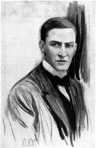 George Ade - Project Gutenberg eText 19325